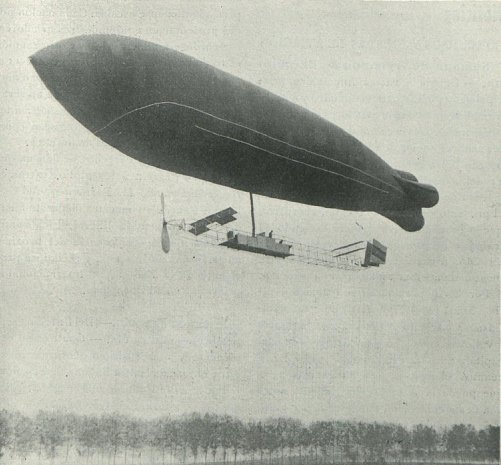 Dirigible militar español «España » destinado á prestar sus servicios en Marruecos. Revista de locomoción aérea 1909